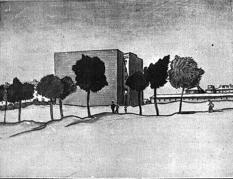 La villa de los solares. Cómo avanza Madrid. Calle del Príncipe de Vergara